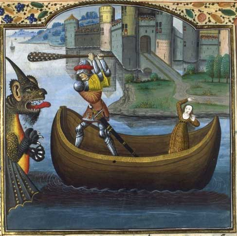 Hercules and Hesione, Raoul Lefèvre, Histoires de Troyes, 15 century